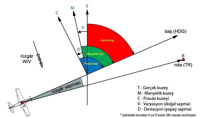 Gerçek, manyetik, pusula kuzeyi; varyasyon (doğal sapma) ve deviasyon (yapay sapma); rüzgar